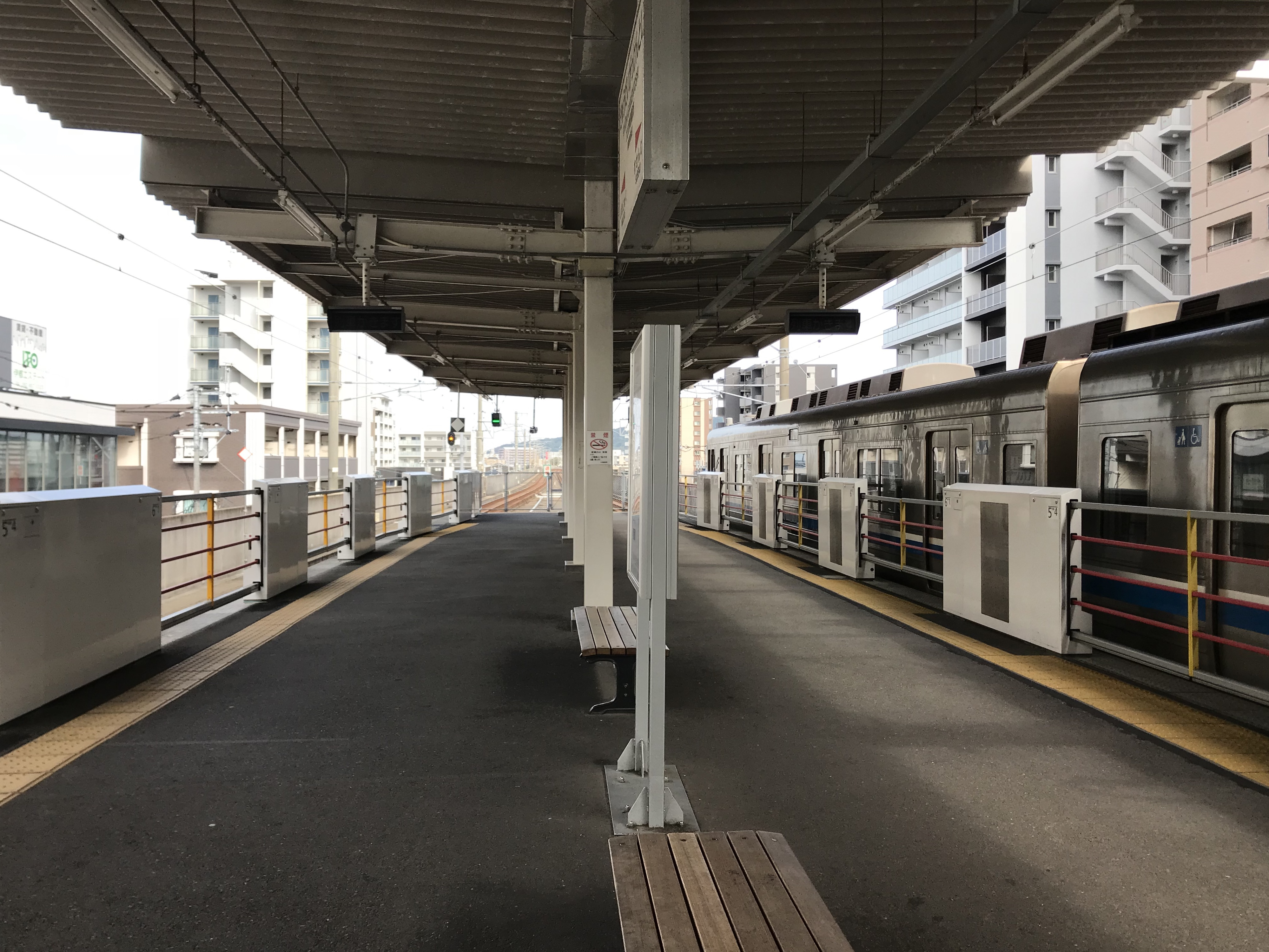 九大学研都市駅のホーム(奥は今宿方面)